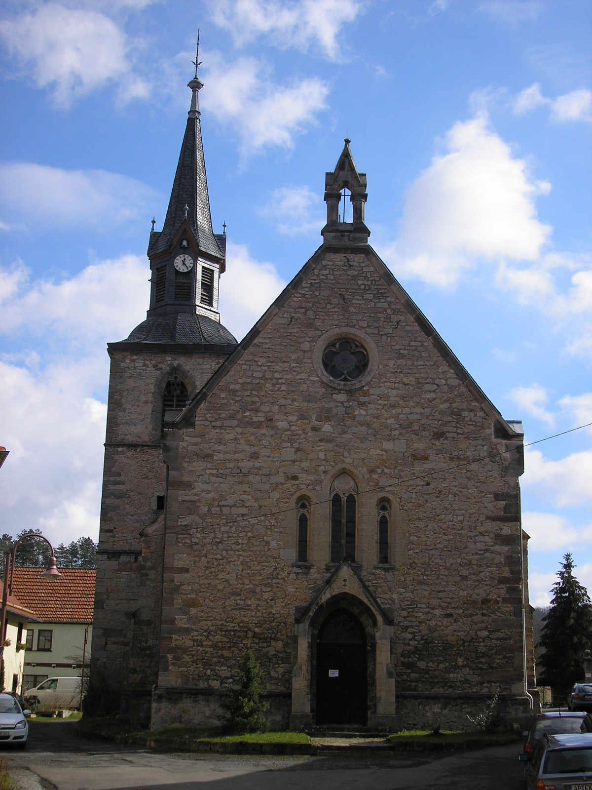 Die Kirche von Kranichfeld (Thüringen).